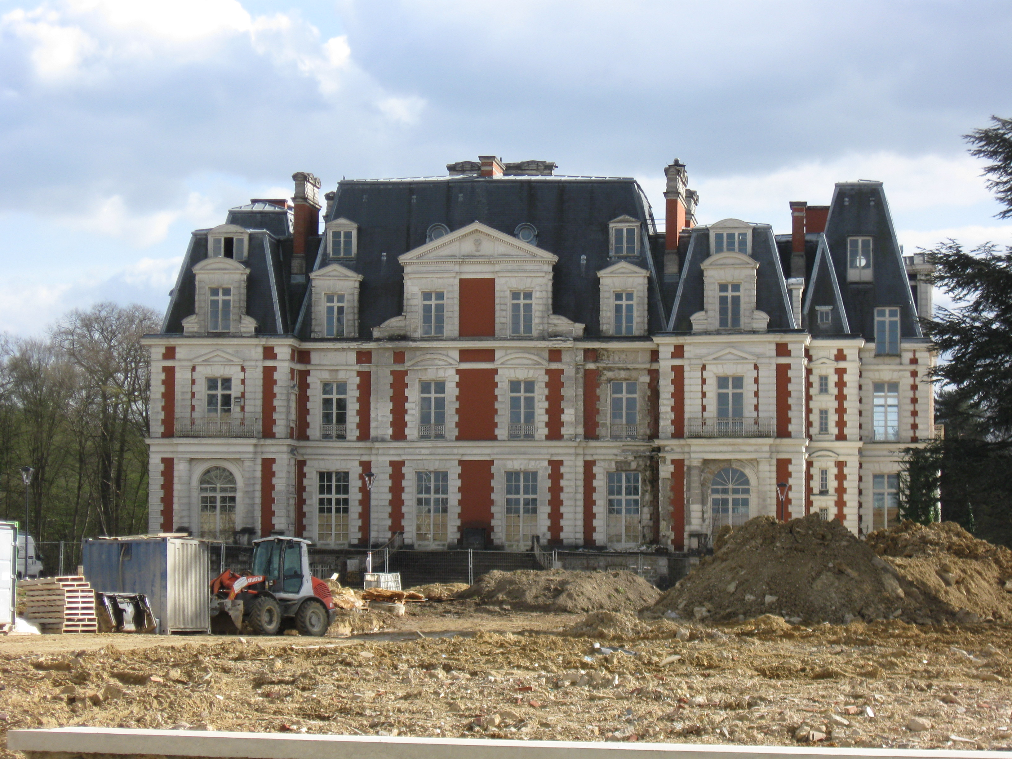 Le château de Malnoue en 2015. (Seine-et-Marne, région Île-de-France).